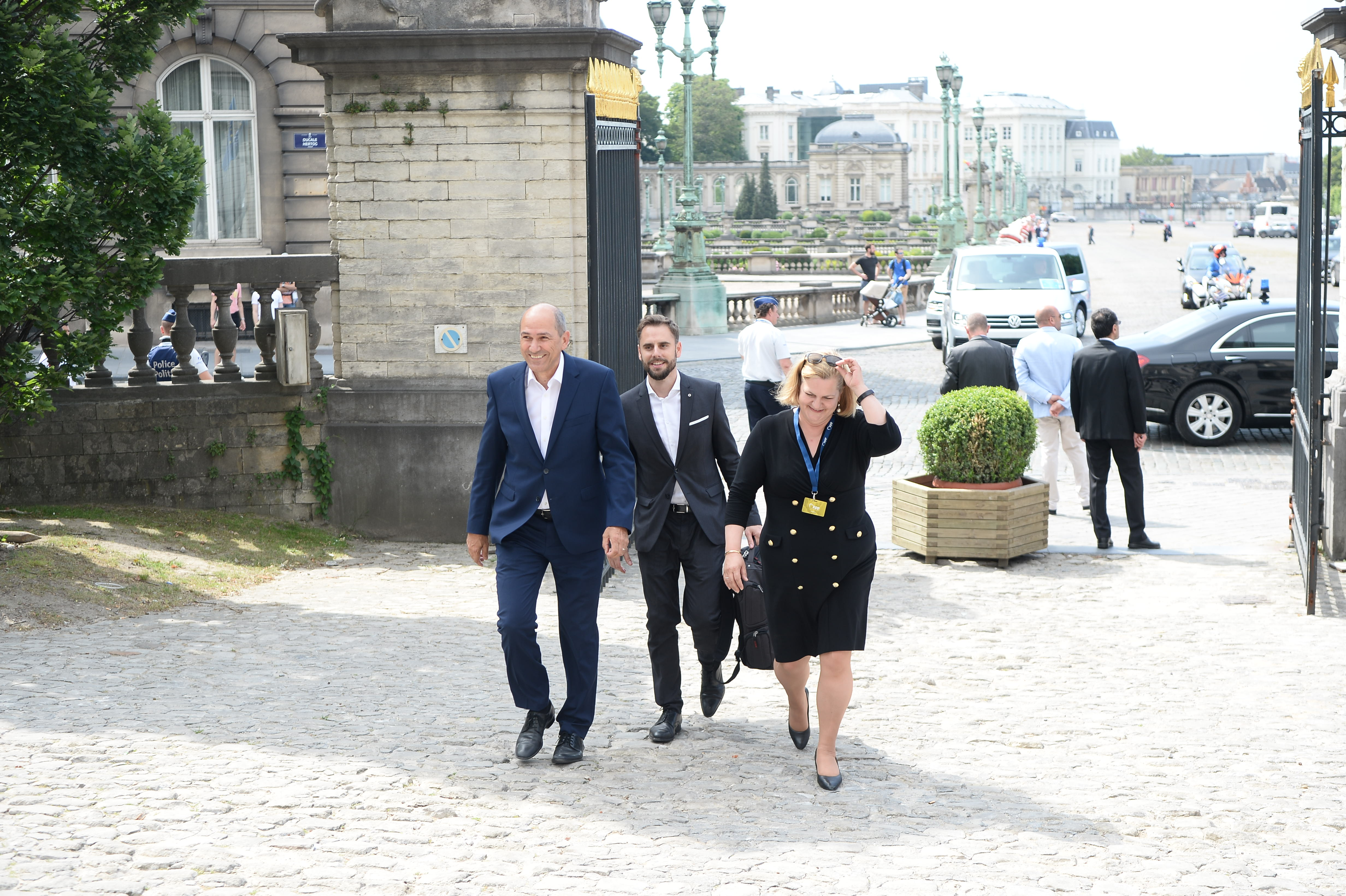 EPP Summit, Brussels, 30 June 2019